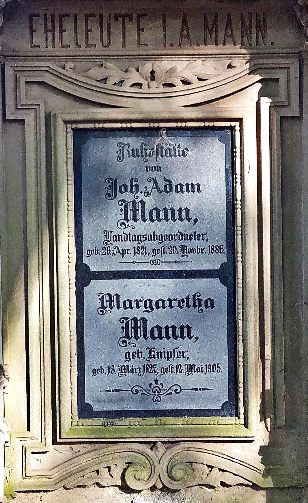 Lautersheim, Friedhof, Grabinschrift des Landtagsabgeordneten Johann Adam Mann (1821-1886)